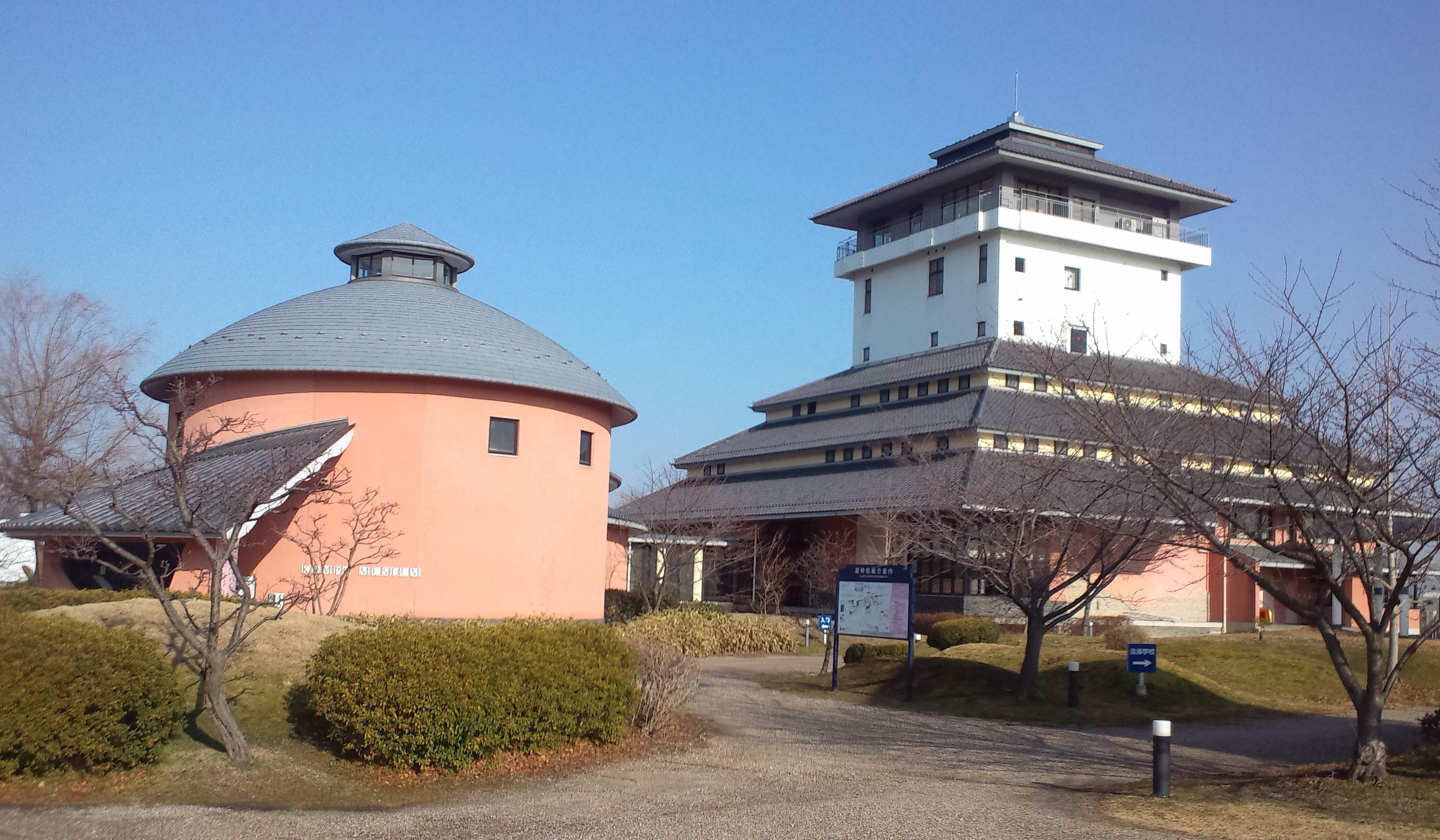 観峰館（かんぽうかん）